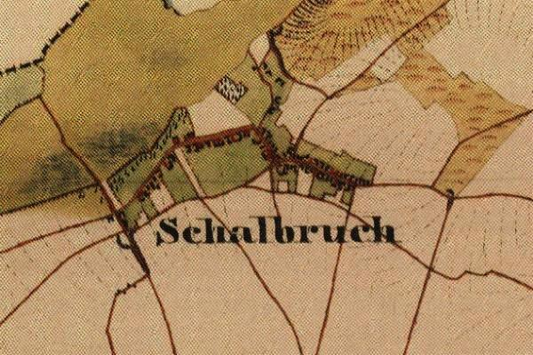 Preußische Kartenaufnahme 1846 - Uraufnahme